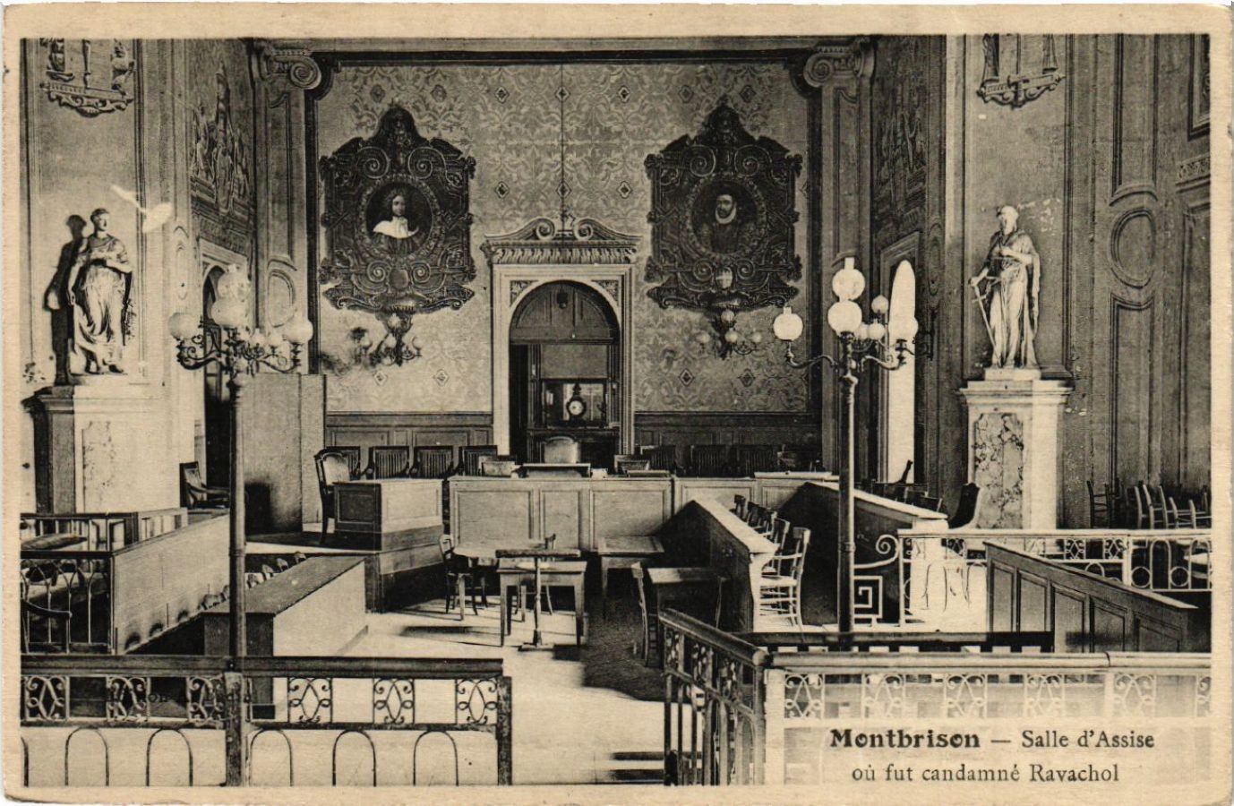 Montbrison - Interior do Corte de Assisses onde o anarquista Ravachol foi julgado.